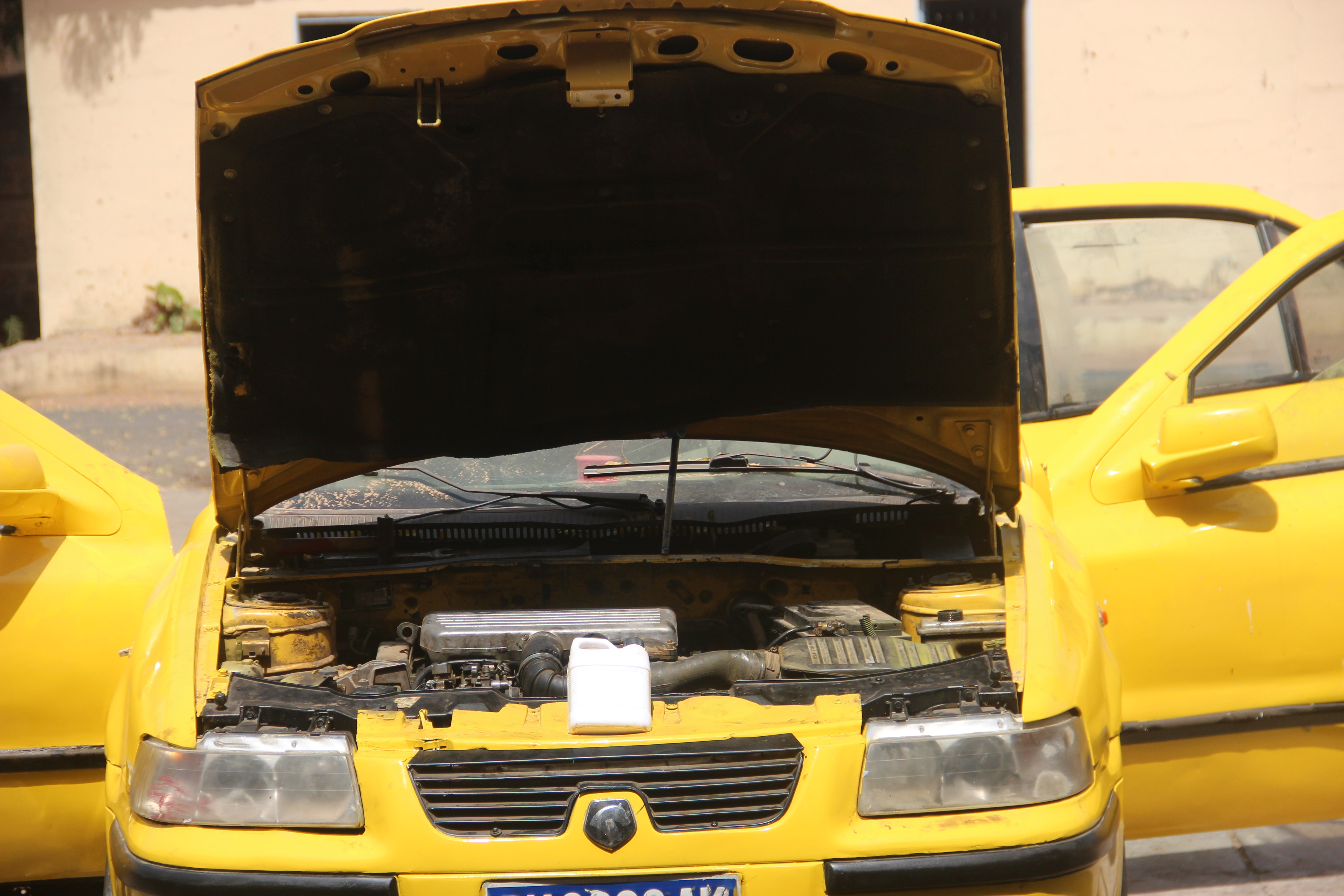 Taxi avec le capot et les portières ouvertes à Thiès, Sénégal. This is an image with the theme "Africa on the Move or Transport" from: Senegal